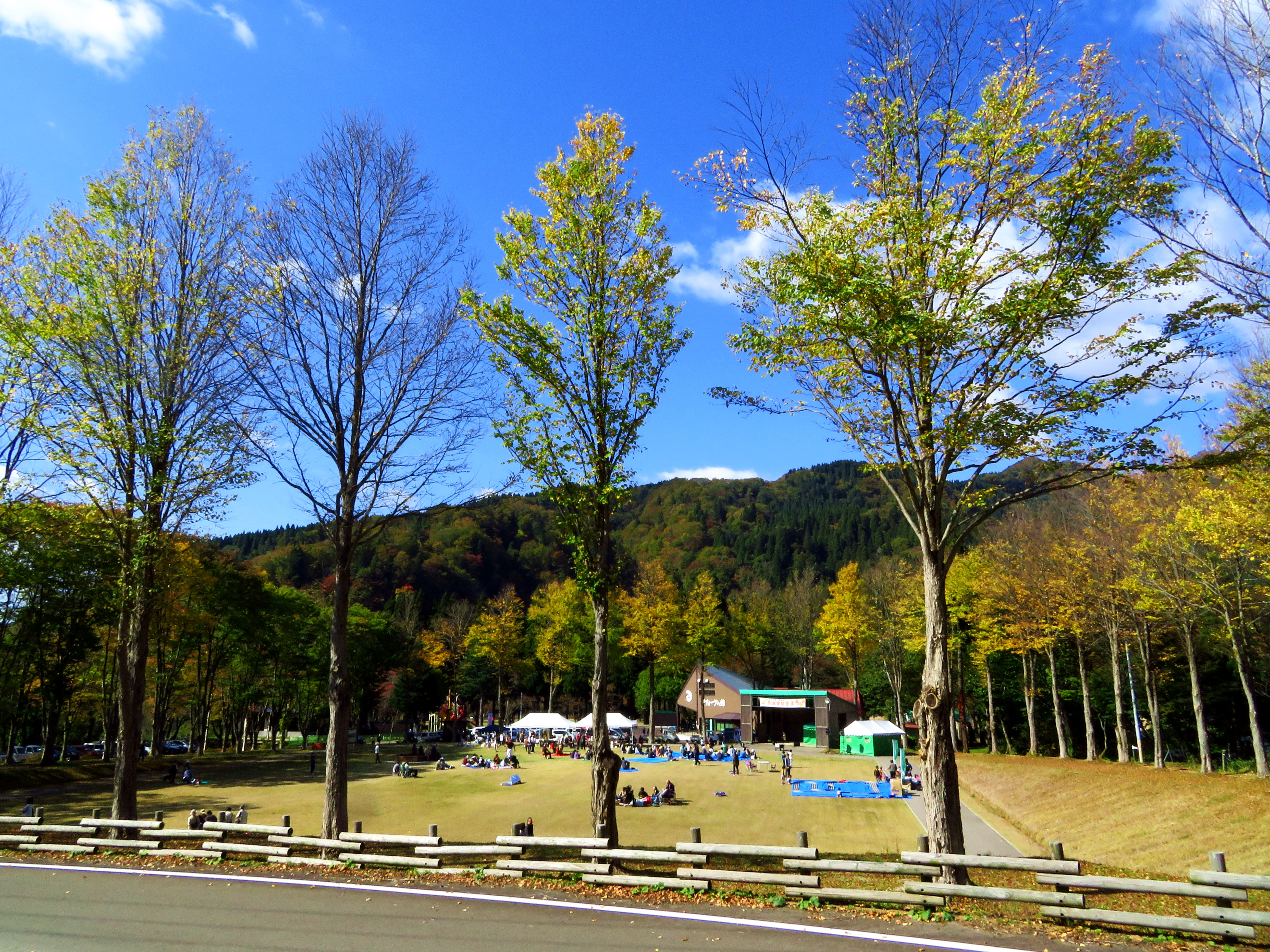 素波里園地：秋田県山本郡藤里町 Canon PowerShot SX720 HS